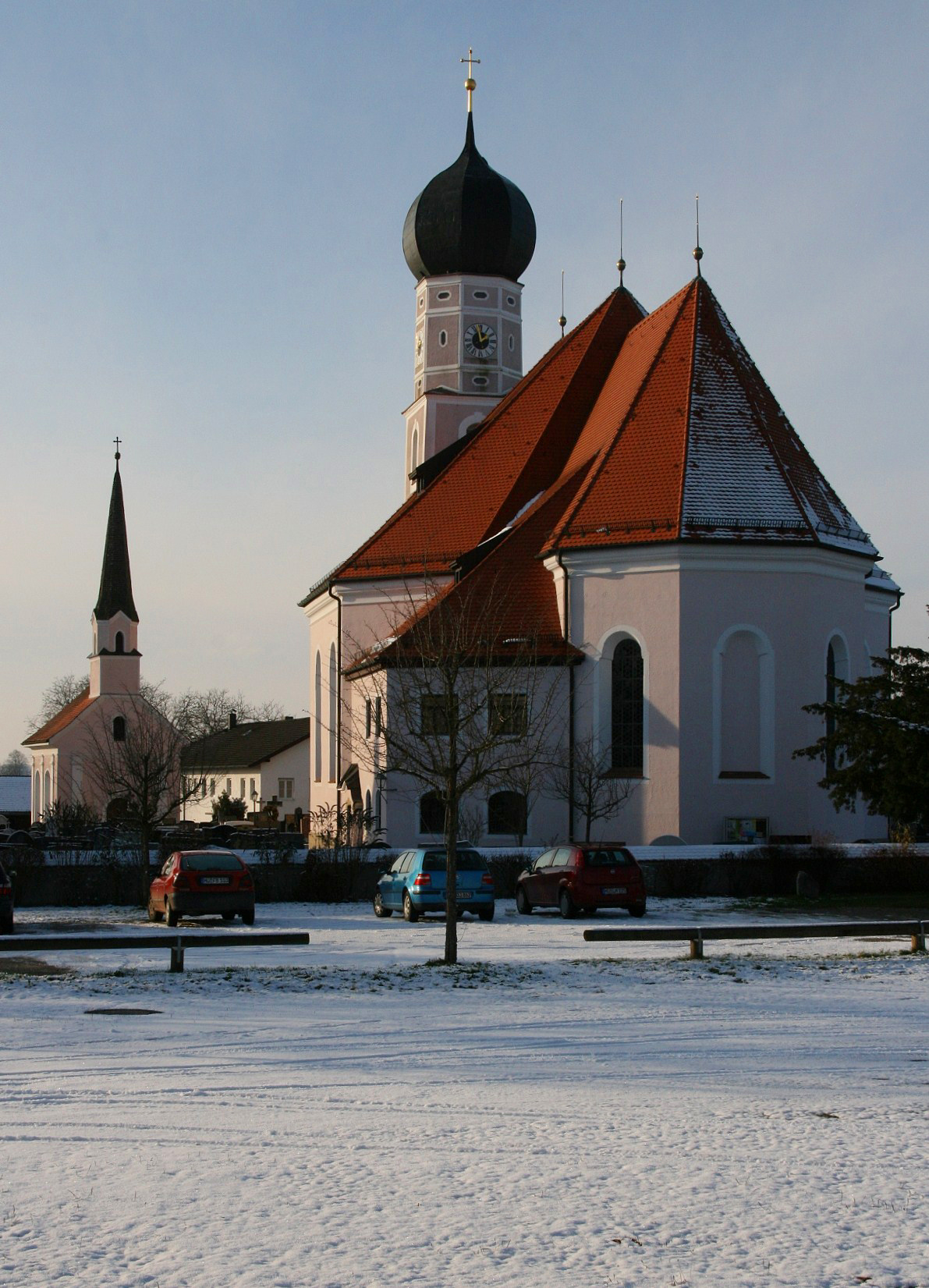 Die katholische Pfarrkirche St. Martin und Magdalena in Obertaufkirchen (Landkreis Mühldorf am Inn, Oberbayern). Das große Gotteshaus vereinigt eine bemerkenswerte Menge verschiedener Stile. Sogar vom ersten Steinbau im Stil der Romanik, entstanden um 1150, sind sichtbare Partien (z.B. Portal) erhalten, ebenso vom spätgotischen Nachfolger, der ab 1450 in Gestalt kam. Die Barockisierung, Rokoko-Gestaltung folgte um 1777. 1910-11 kam es per Neubau zu einer Vergrößerung im Bereich vorderes Langhaus und Chor, die im neubarocken Stil zur Ausführung gelangte. Im Bild die Rückseite mit Chor, links davon die Friedhofskapelle.